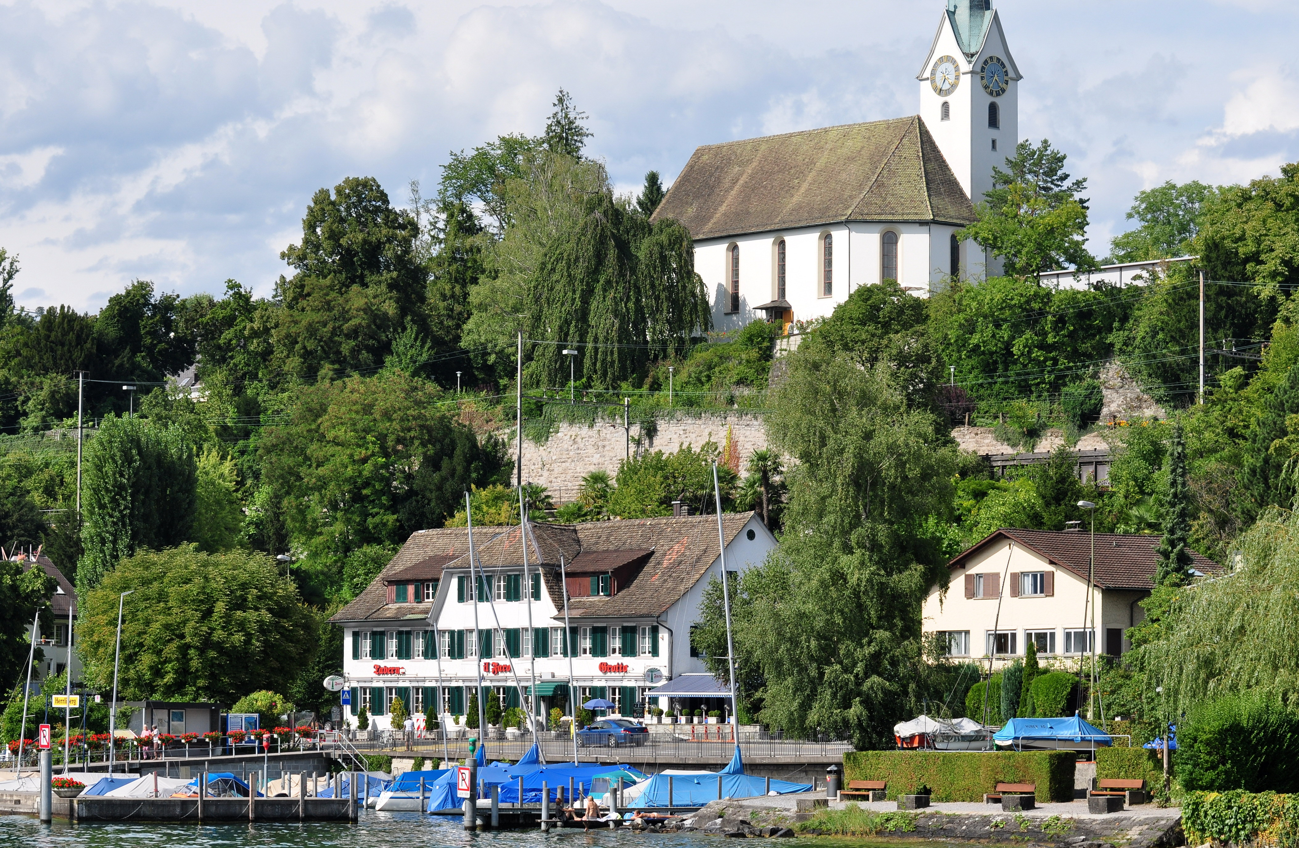 Herrliberg (Switzerland) as seen from Zürichsee-Schifffahrtsgesellschaft (ZSG) paddle steamship Stadt Rapperswil